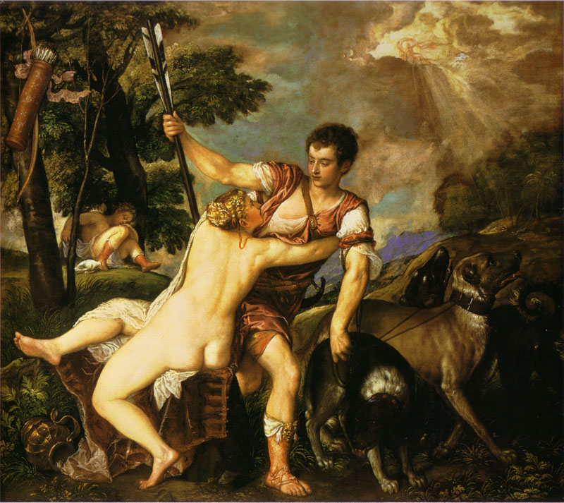 Venus and Adonislabel QS:Len,"Venus and Adonis"label QS:Lit,"Venere e Adone"